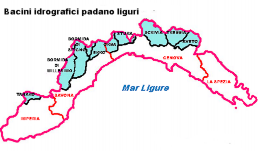 Bacini idrografici padano liguri (rielaborazione da Piano per la valutazione e la gestione del rischio di alluvioni, Autorità di bacino del Po, 2015, on-line su